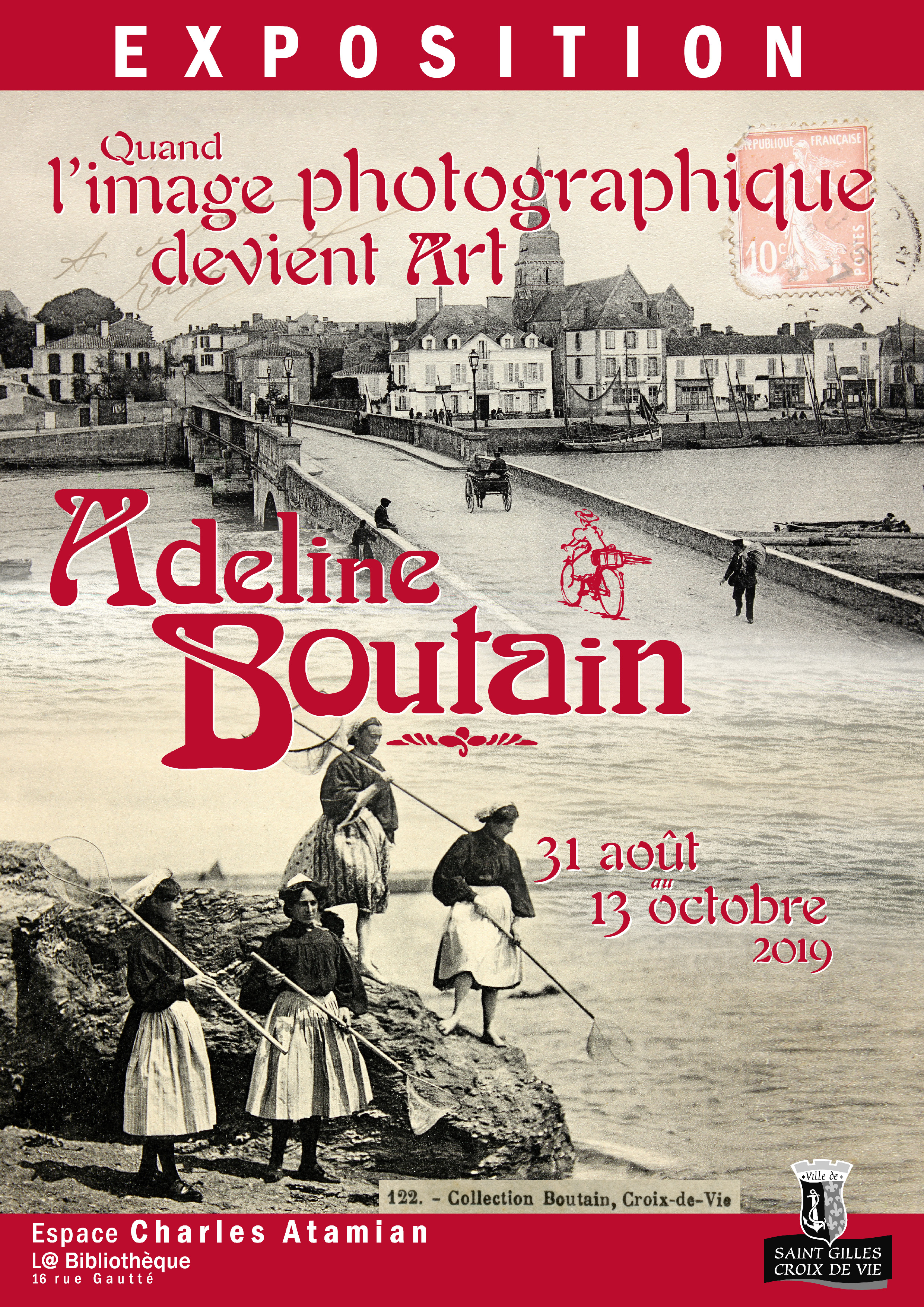 Affiche composée avec les cartes postales d'Adeline Boutain : No 121, St-Gilles — Le pont et les quais ; No 377, St-Gilles-Croix-de-Vie — Pêcheuse de Crevettes. Polices Franklin Gothic, Auriol, Arnold Boecklin.